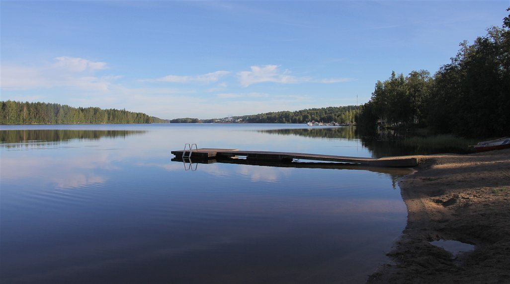 Otavan uimarantaa, Puulavesi, Otavan taajama, Mikkeli.